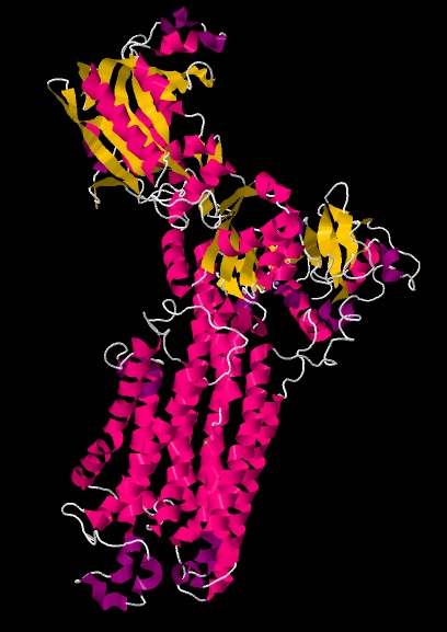 Estructura cristalográfica SERCA